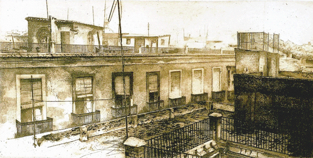 Grabado estampado de publicación José Antonio Sánchez Baillo